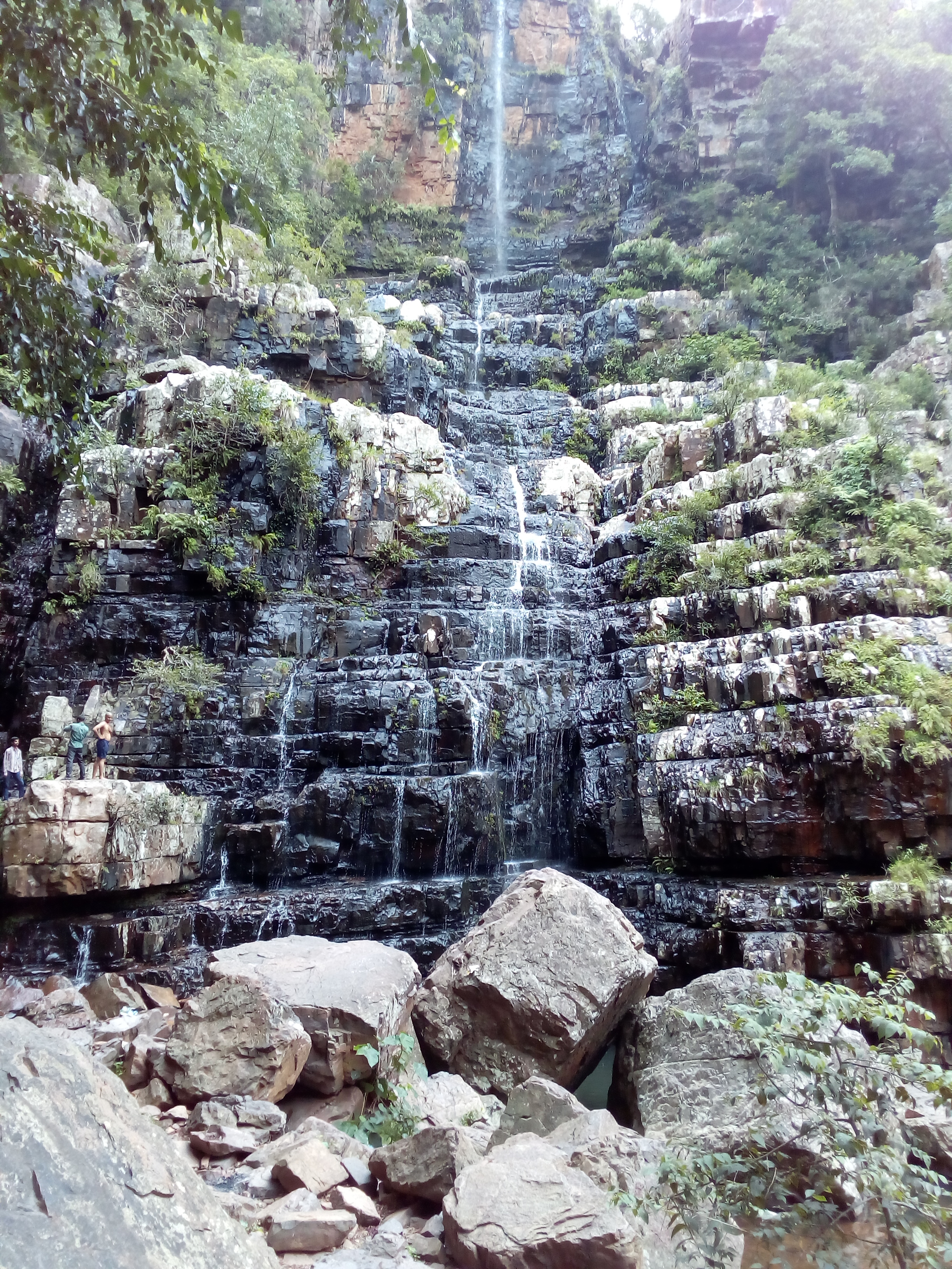 తలకోన జలపాతం